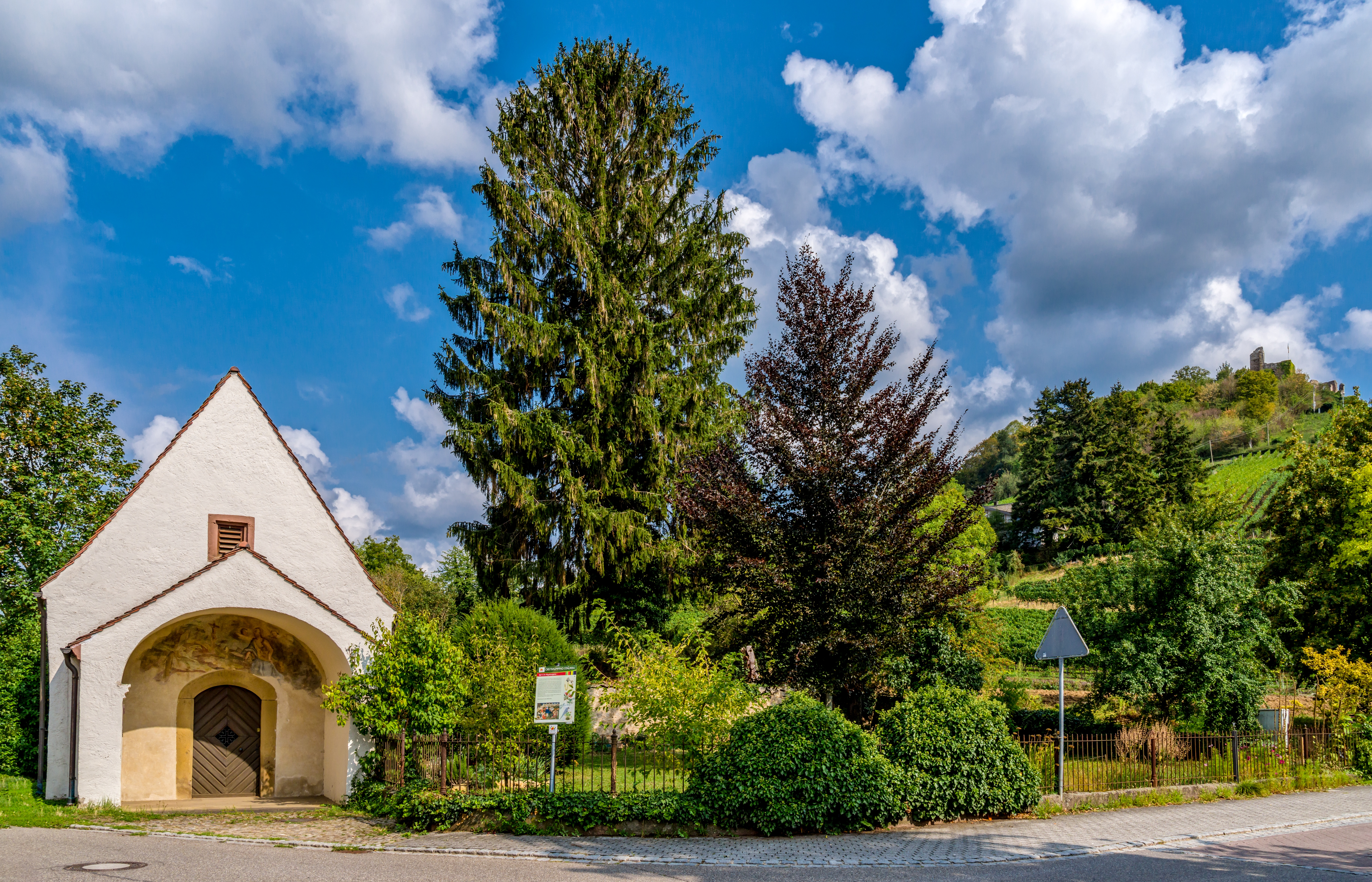 Bilder aus Staufen im Breisgau, die St. Magdalenenkapelle